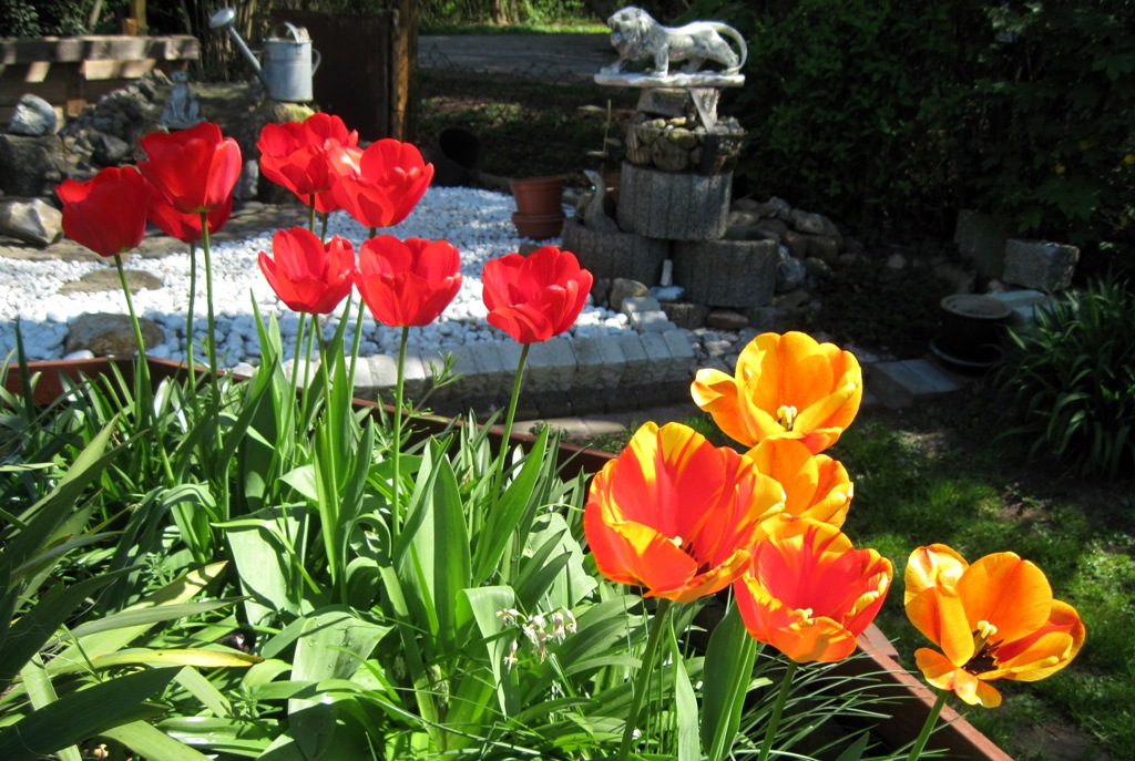 Offene Ziertulpen im Gartenbeet des Frühjahres